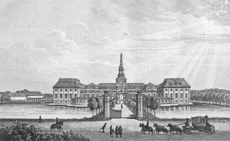 Hirschholm Slot var et slot i barokstil beliggende i det nuværende Hørsholm. Slottet blev opført i 1730–44 af hofbygmester Lauritz de Thurah; nedrevet i 1810-11